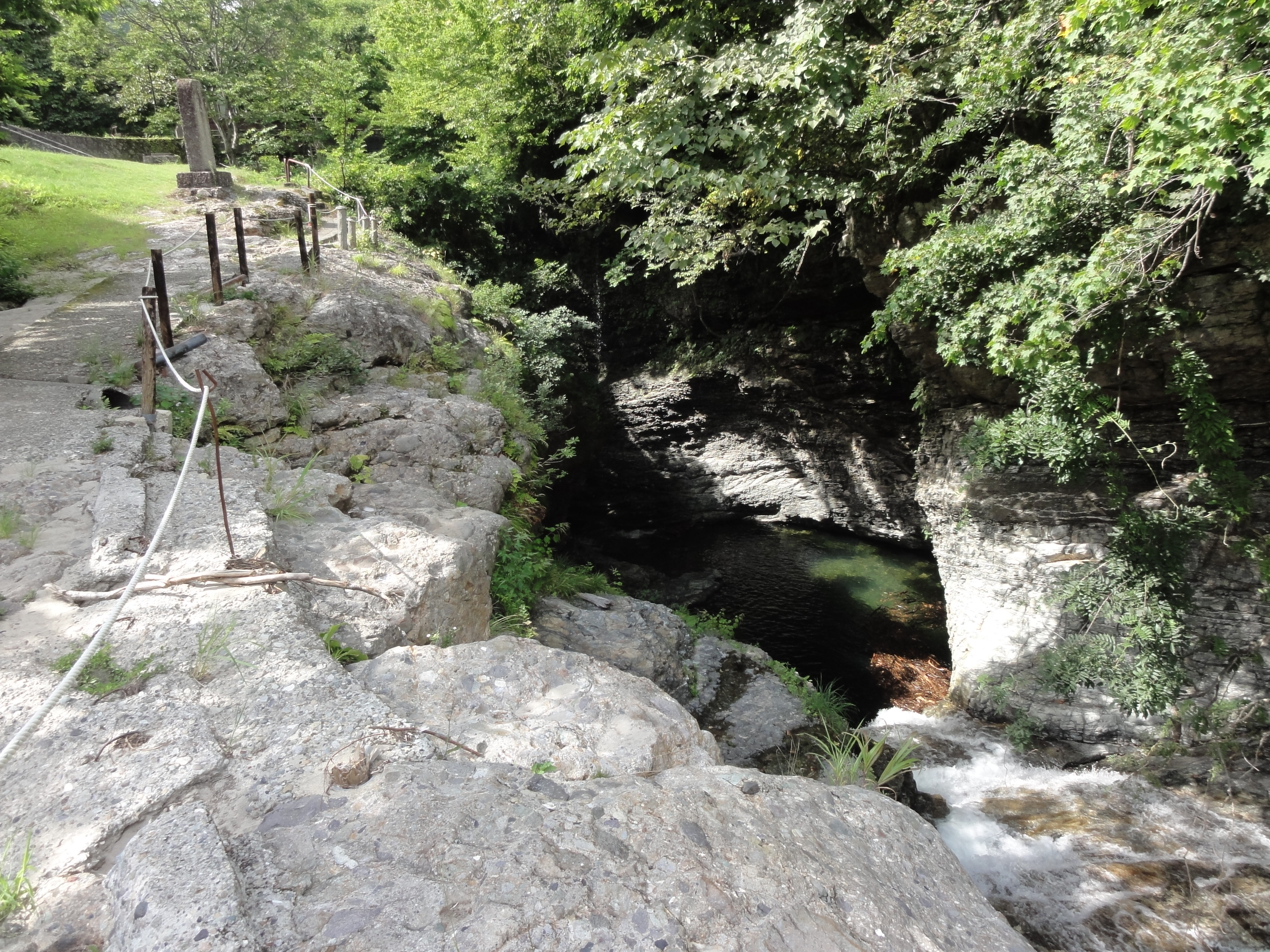 小安峡の不動滝。秋田県湯沢市。